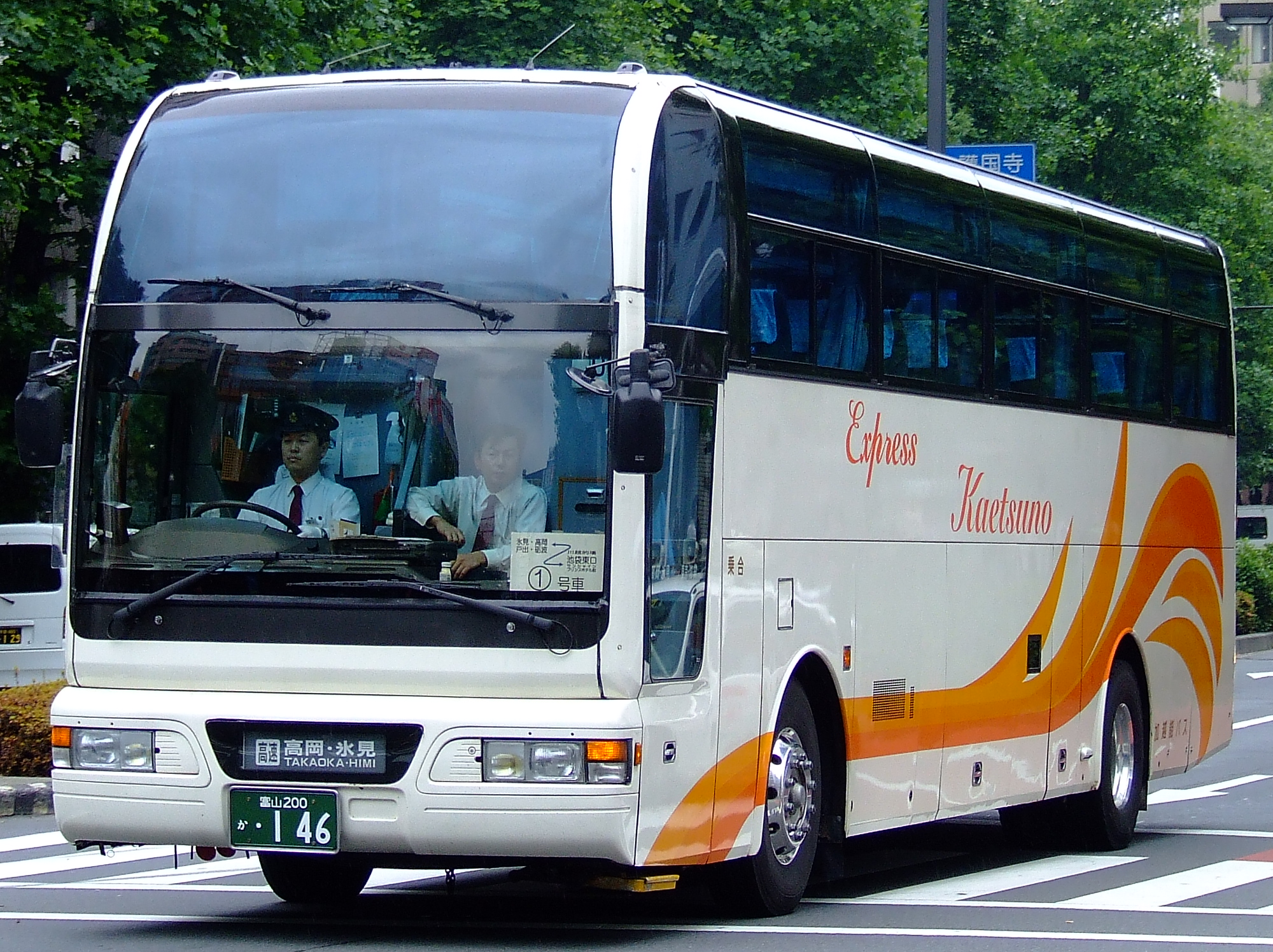 加越能鉄道の高速バス東京～高岡・氷見線 池袋駅東口付近（東口五差路交差点）にて